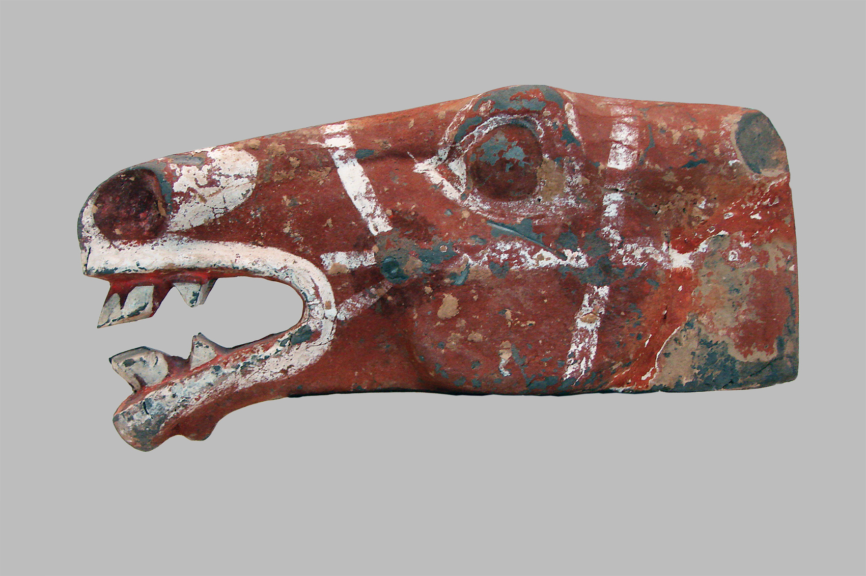 Tête de cheval. Dynastie Han, 3ème s - JC / 1er s + JC, terre cuite grise polychrome. Musée Guimet, Paris. La qualité de conservation des couleurs sur ce type d'objet est exceptionnelle : extrait du cartel du musée.